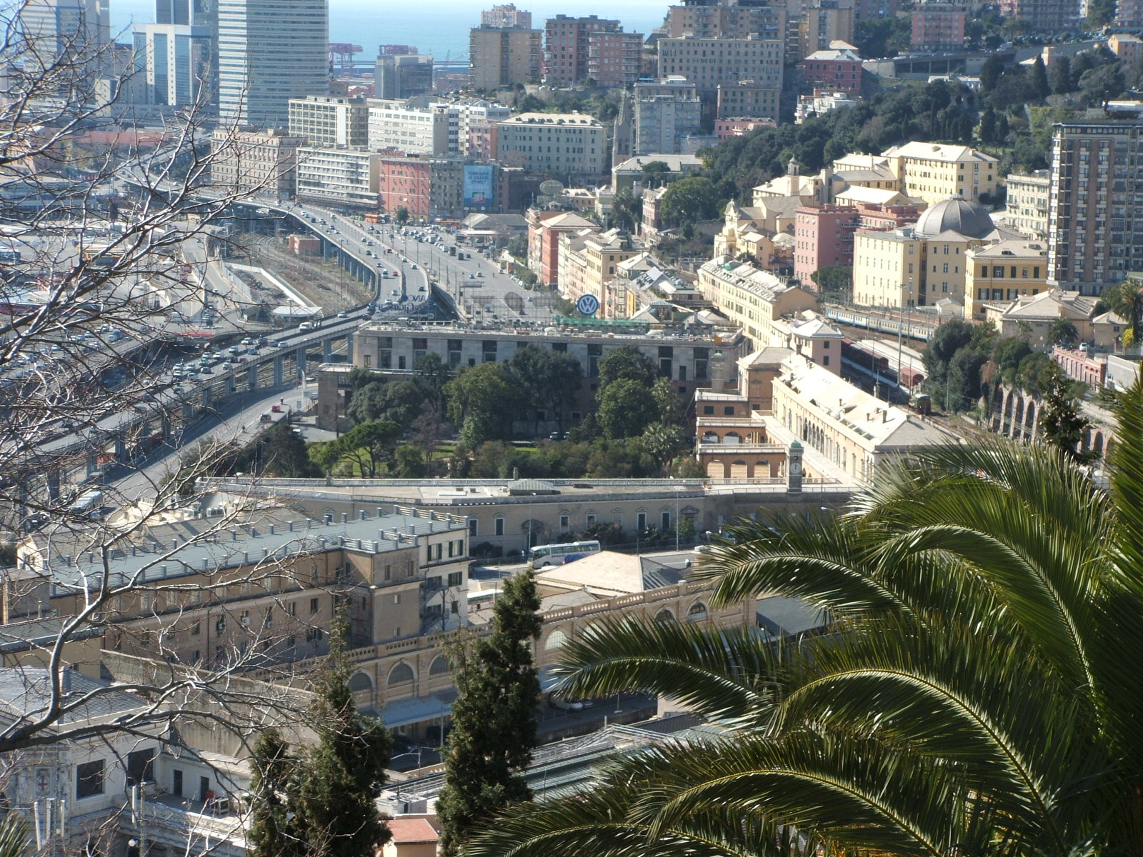 Panorama di Genova, con veduta sul Palazzo del Principe, dal Castello d'Albertis